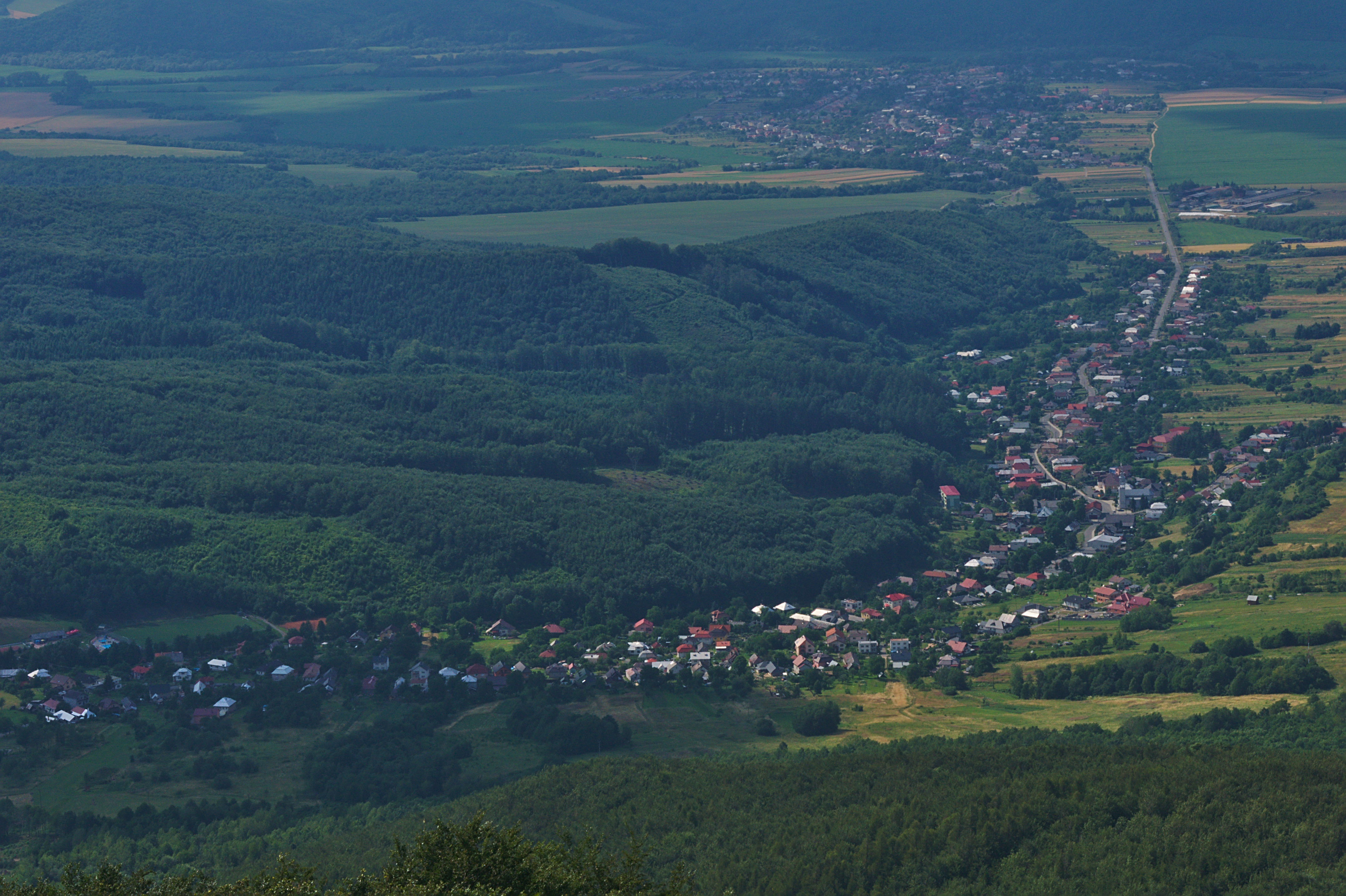 Prírodná pamiatka Sninský kameň - pohľad na obec Zemplínske Hámre, CHKO Vihorlat